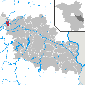 Erkner in Brandenburg (Country) - District Oder-Spree